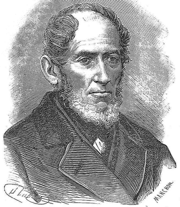 Xoán Manuel Pintos Villar